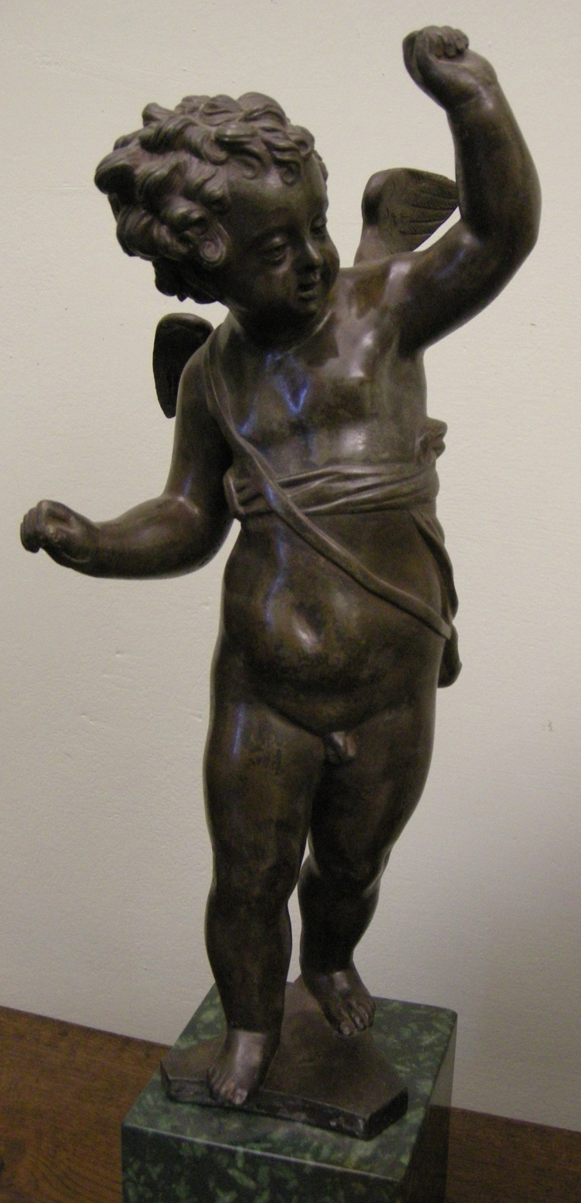 Casa siviero, sala del maestro della natività johnson, niccolò di roccatagliata, cupido